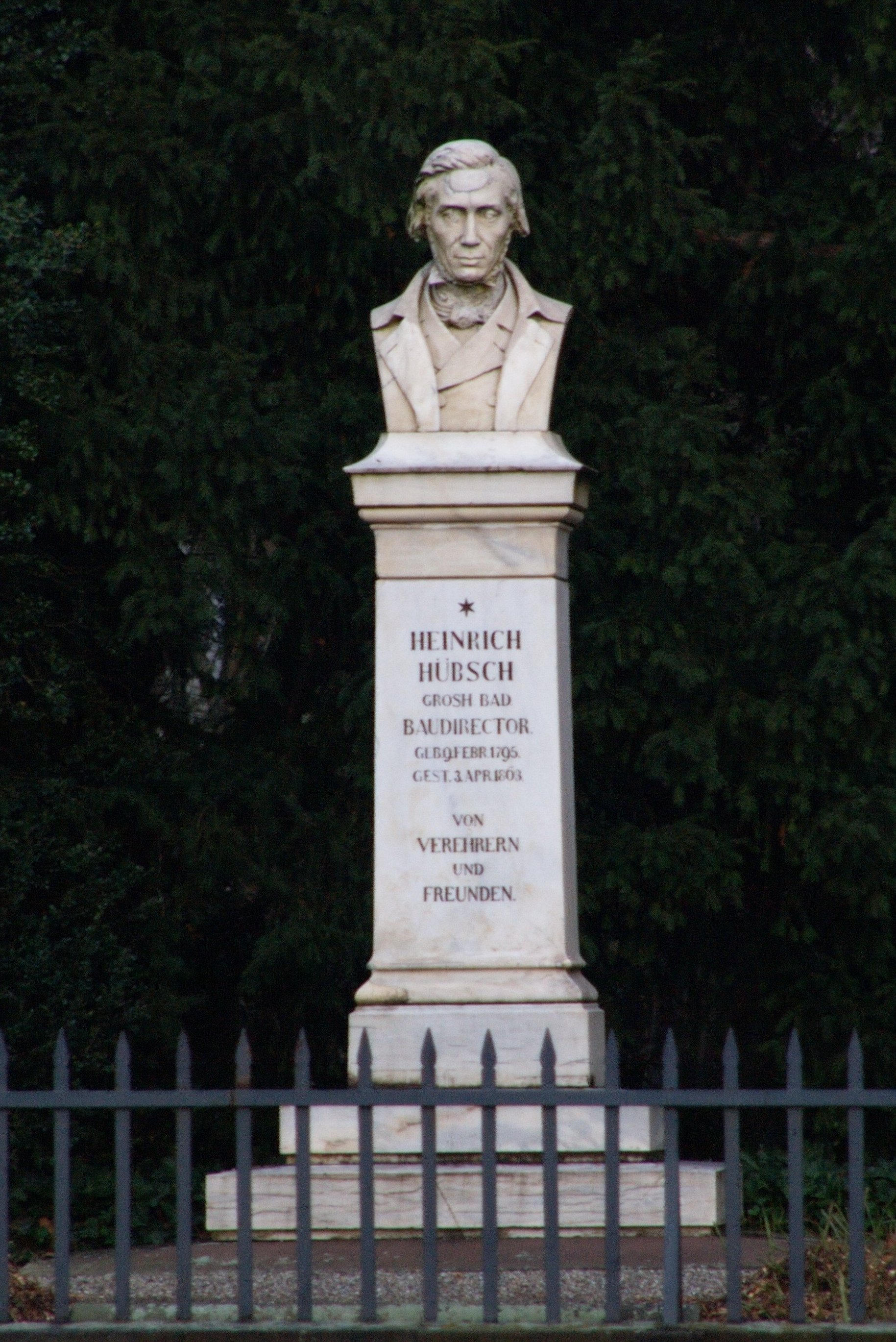 Von Karl Friedrich Moest geschaffenes Denkmal für Heinrich Hübsch in Karlsruhe